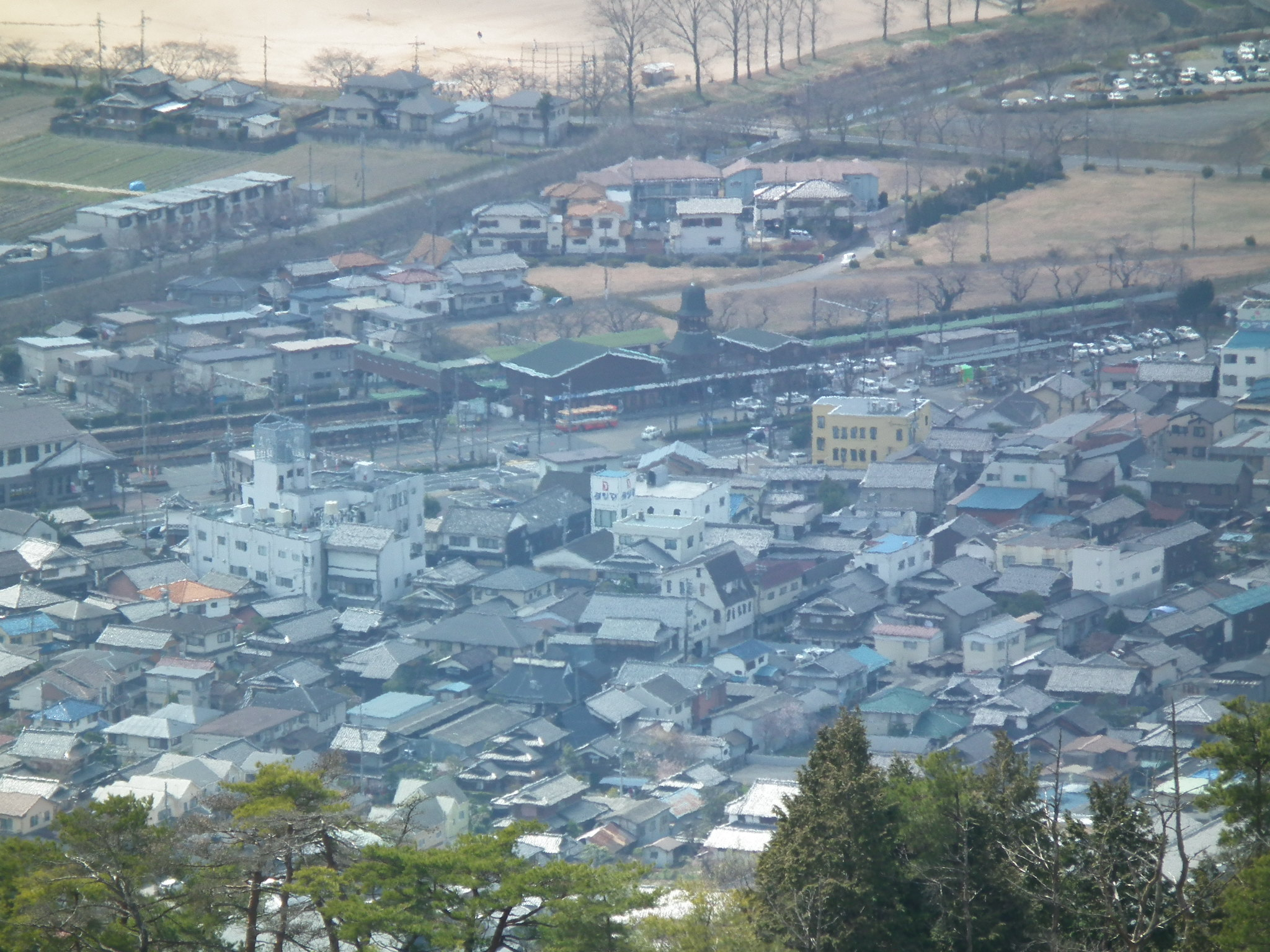 Kaibara Station aerial photograph 2010-03-27 福知山線柏原駅 航空写真 2010-03-27 譲葉山上空にてヘリコプターより撮影